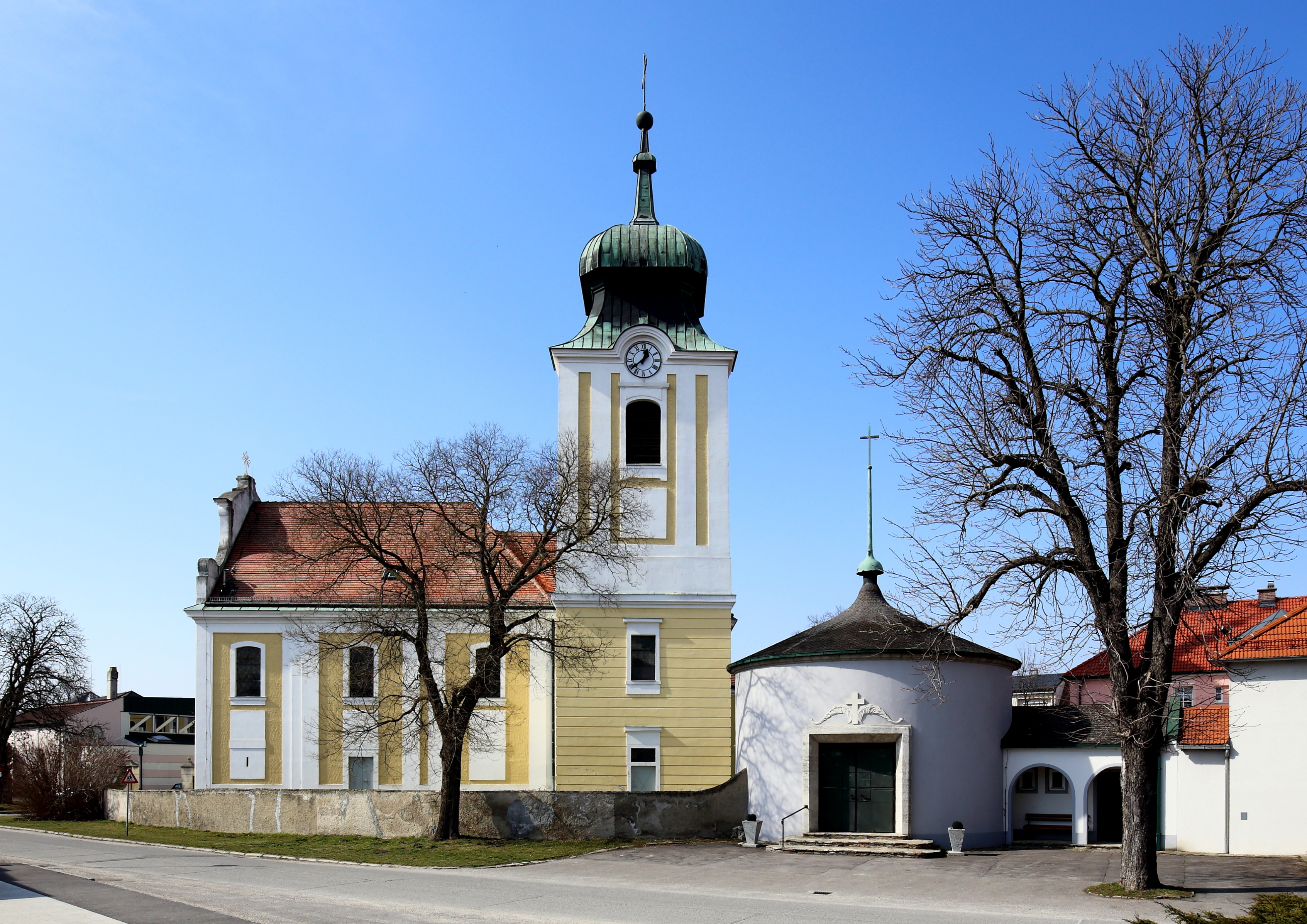 Südostansicht der katholischen Pfarrkirche hl. Markus in der niederösterreichischen Marktgemeinde Leopoldsdorf im Marchfelde. Der barocke Sakralbau wurde von 1771 bis 1774 errichtet, wobei vermutlich der Turm des Vorgängerbaues bis zum Glockengeschoß in den Neubau integriert wurde.